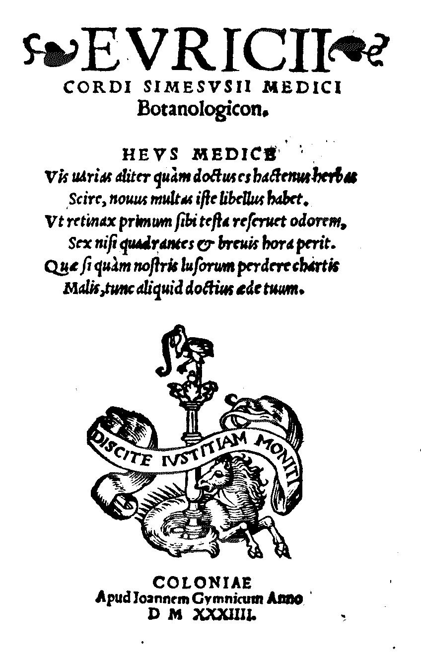 Titelblatt des Botanologicons von Euricius Cordus, erschienen 1534 in Köln